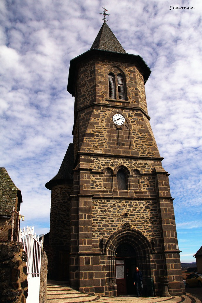 église CANTOIN Aveyron